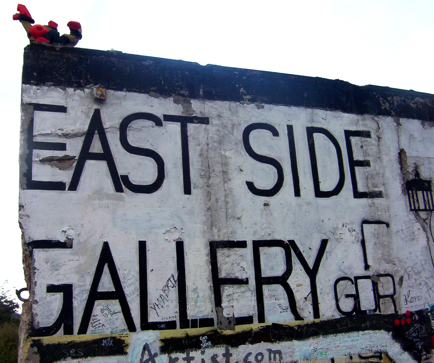 Der Beginn der East Side Gallery nahe der Oberbaumbrücke.